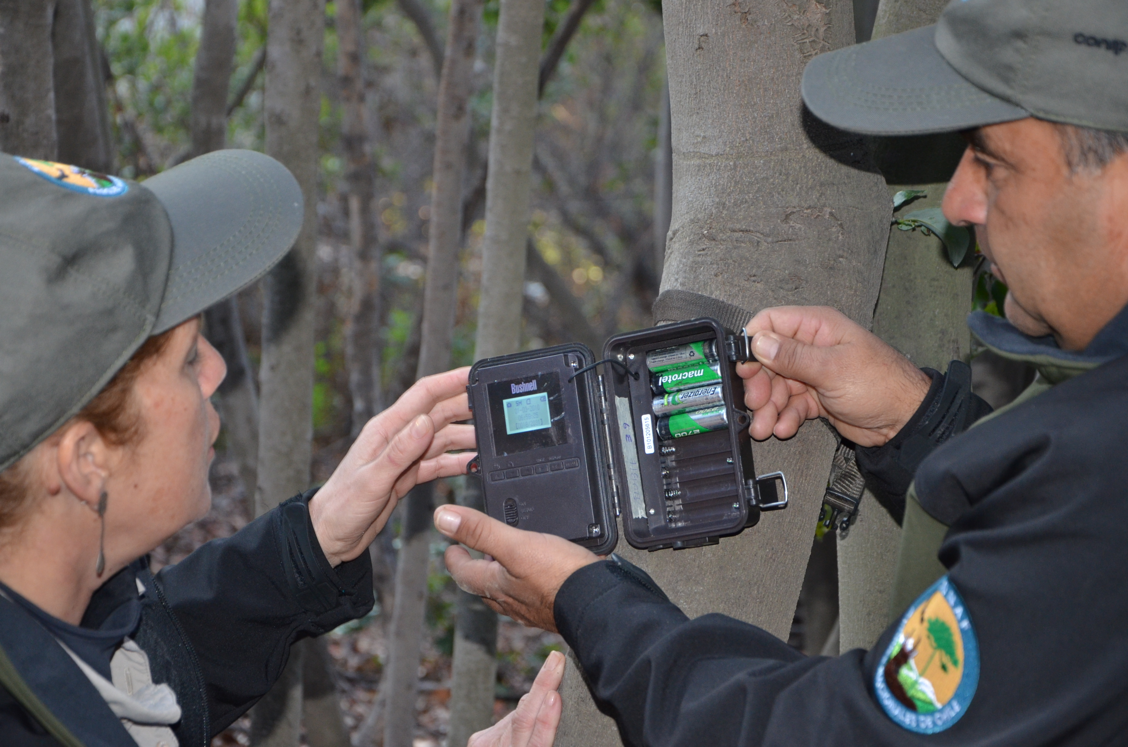 Guardaparques de la Reserva Nacional Río Clarillo (Región Metropolitana) instalan cámaras trampa, con las que se obtienen registros de fauna sin perturbarlos con presencia humana, a través de la activación de sensores de movimiento, que incluso funcionan en la oscuridad. Con tales imágenes es posible realizar estudios sobre esta área.